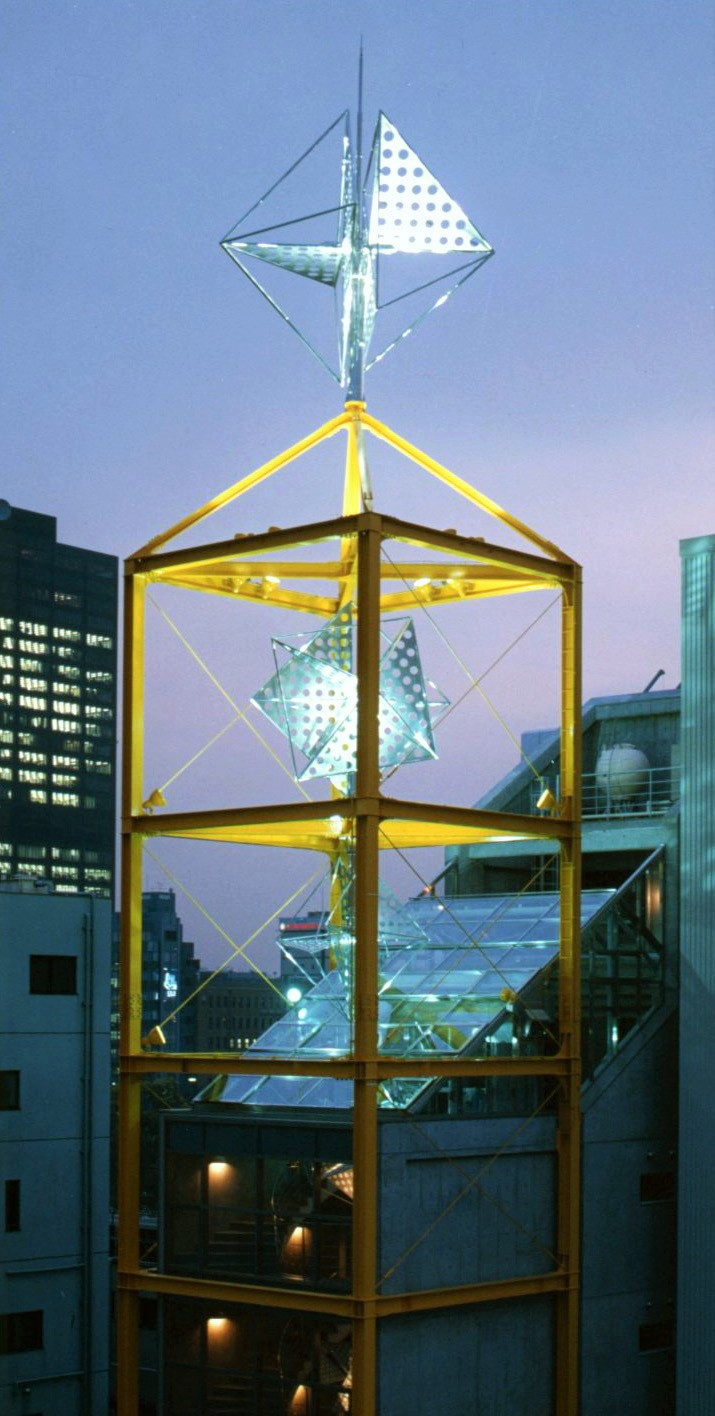 日本の大阪市 北区 天満にある「動く彫刻と建築の一帯作品」。 総合デザイン・設計は日本の彫刻家である新宮晋。施工は松村組。設計管理は尾形建築事務所。構造は山田建築構造事務所。ブレーンセンターの本社ビル。1992年竣工。